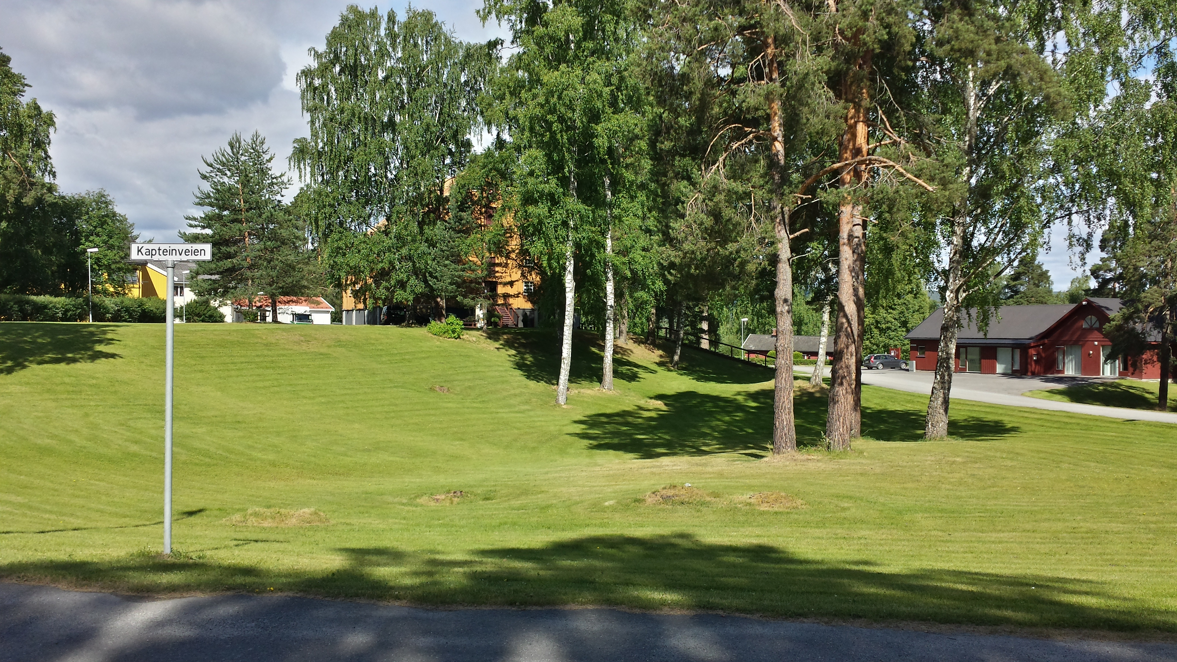 Helgelandsmoen er en tidligere militærleir i Hole kommune i Buskerud, som nå er omgjort til en suksessfull næringspark. Her finnes blant annet rekrasjonsbedriften NIMI, Hotell Generalen, Ringeriksbadet med treningsstudioet Actic og mye mer.